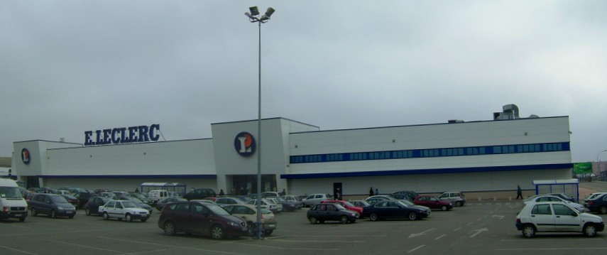 Hipermercado E.Leclerc de Miranda de Ebro (España) 4.500 m2 de sala de venta.